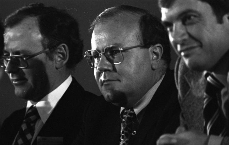 27. Bundesparteitag der FDP in Frankfurt/Main (v.l.n.r.: Dr. Hans-Otto Scholl, Martin Bangemann, Helmut Schäfer)